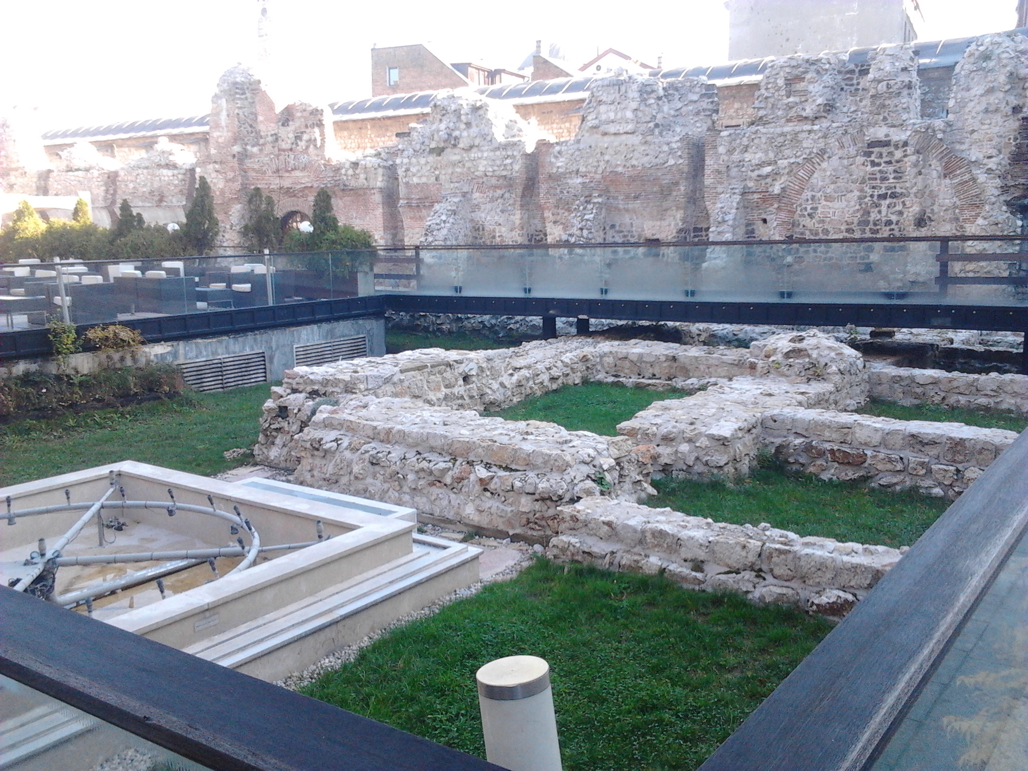 Foto e bere afer Hotel Europe ne qender te Sarajeves